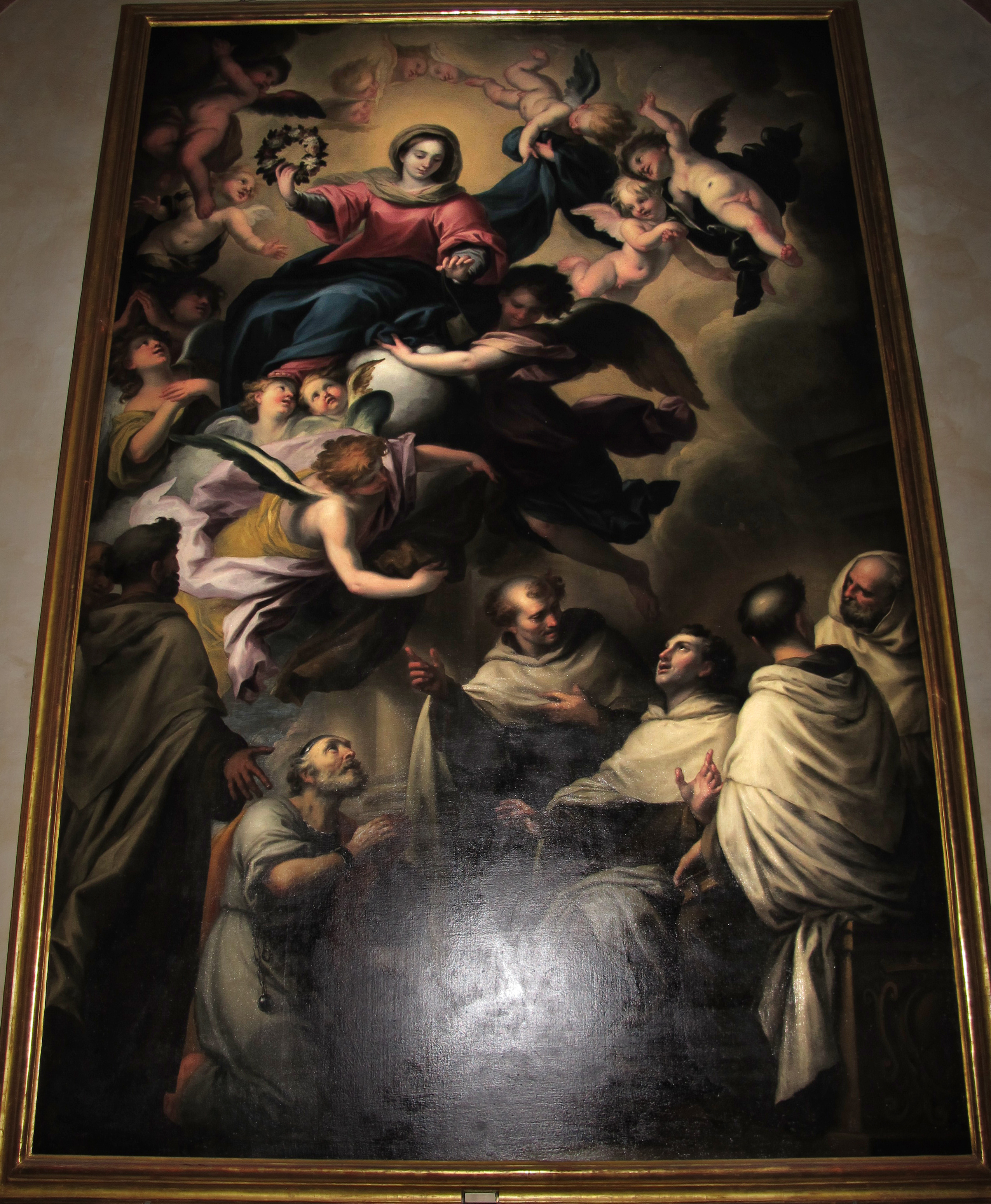 Nostra Signora del Carmine e Sant'Agnese (Genova)